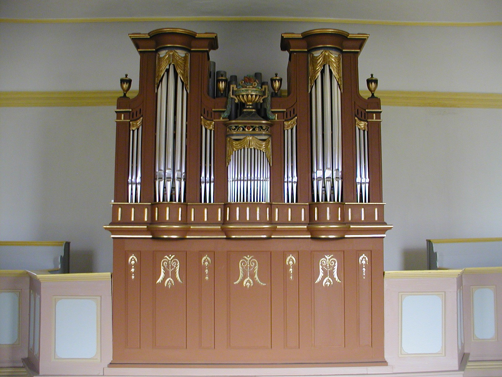 Orgel der Evangelischen Kirche Rupppertsburg, Laubach, Landkreis Gießen, Hessen, Deutschland